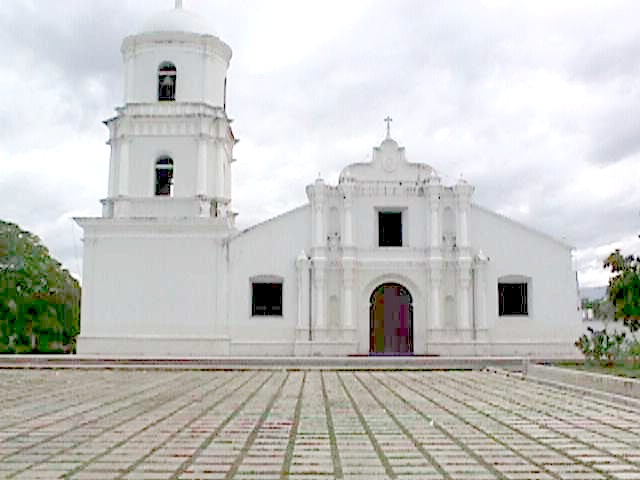 Catedral del Tocuyo